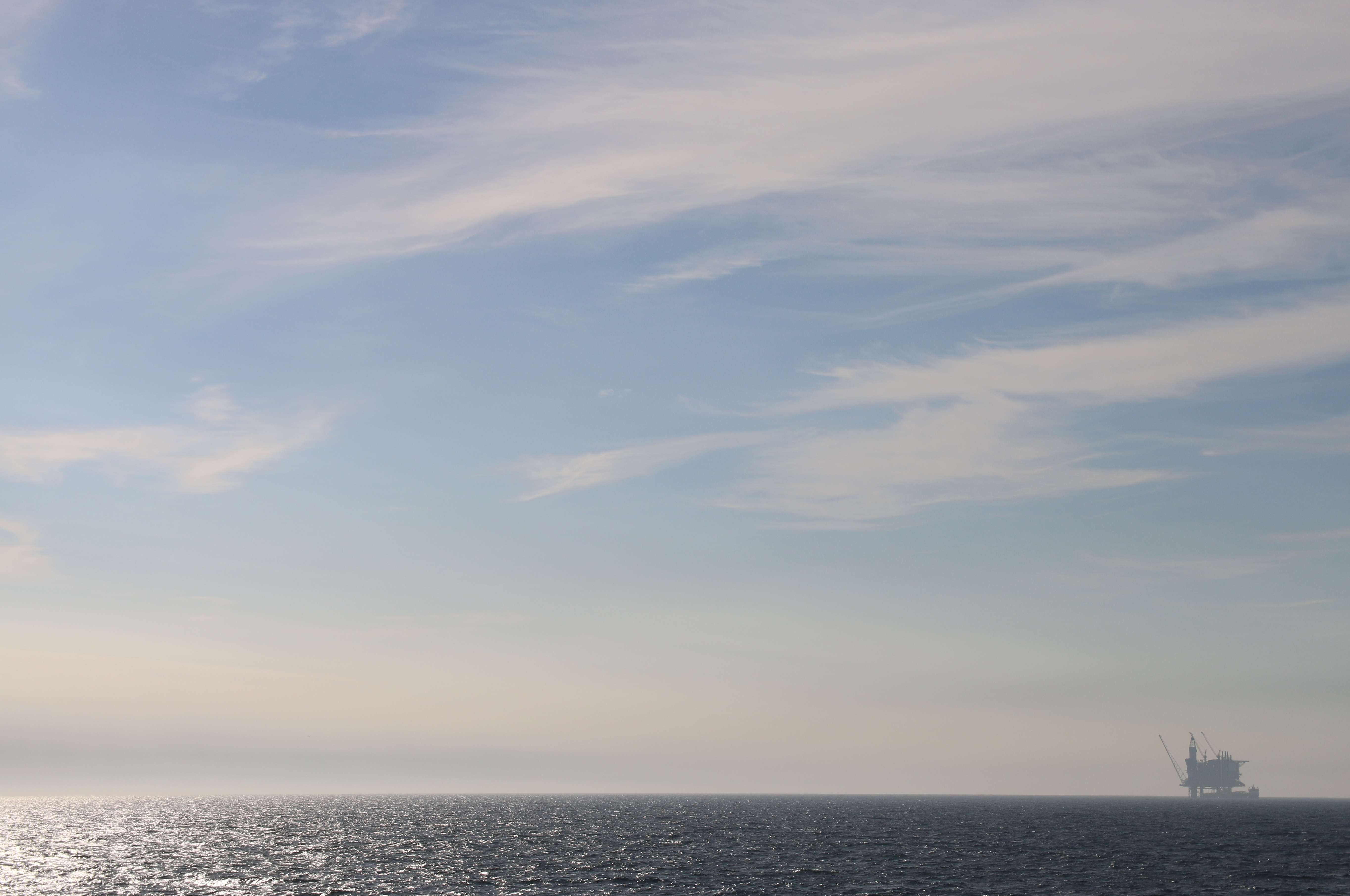 Oljefeltet Grane i Nordsjøen er bygd ut med en integrert bolig-, prosess- og boreplattform med bunnfast stålunderstell. Plattformen befinner seg omkring 185 kilometer vest for Haugesund. Havdypet er 127 meter. Foto: Øyvind Knoph Askeland, Norsk olje og gass